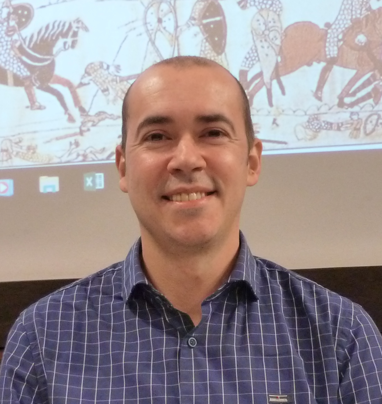 Santiago Lopo